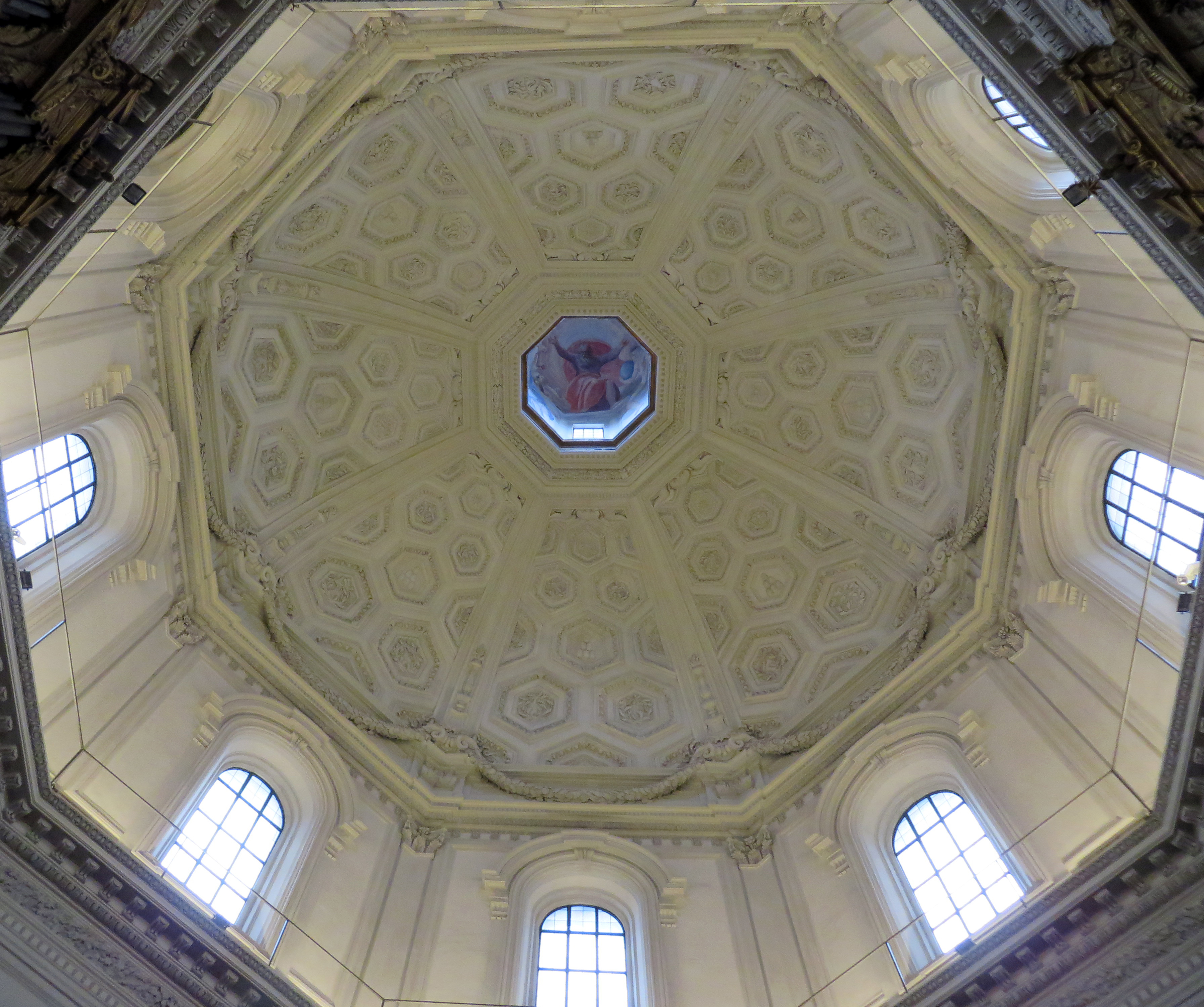 Cúpula